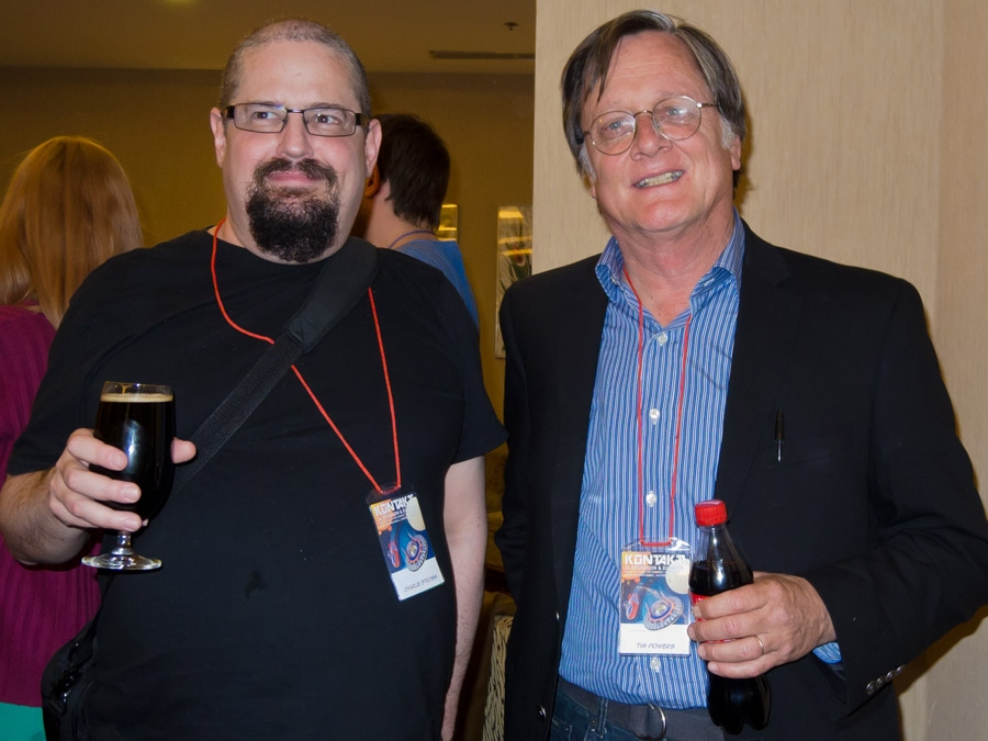 Konvencija Kontakt, koja je spojila 34. SFeraKon i 34. Eurocon u Zagrebu